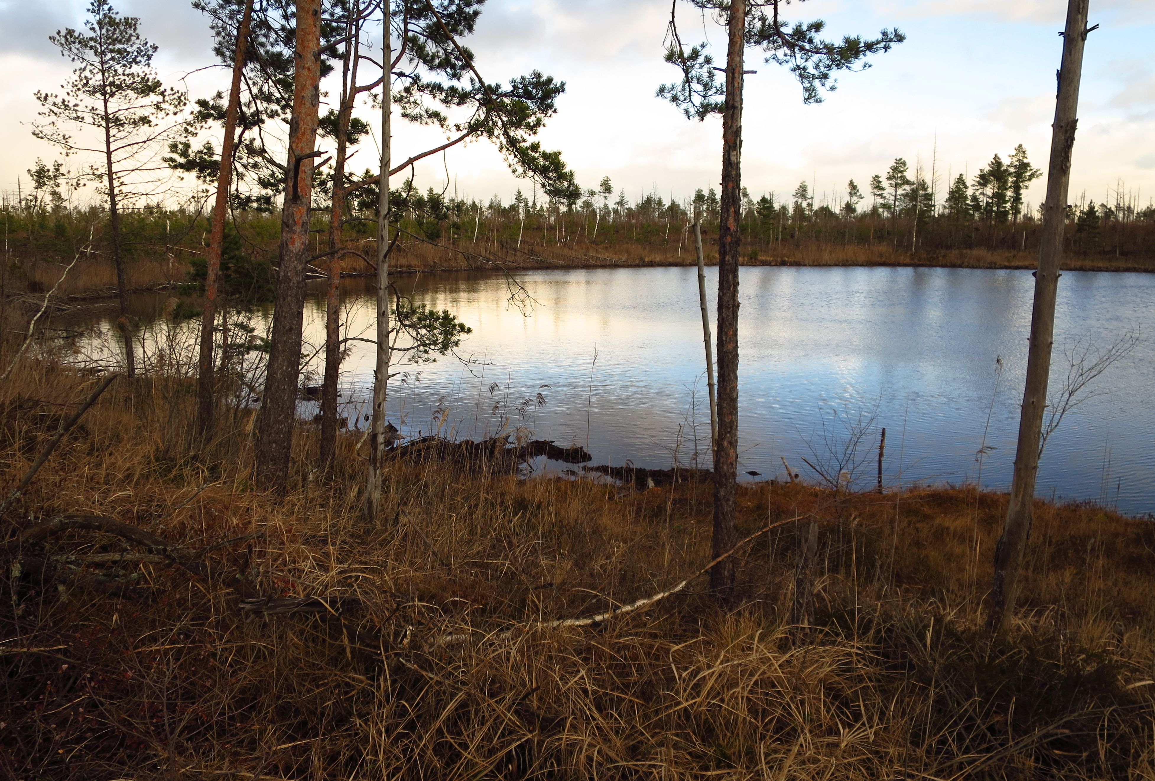 Kurtna Kulpjärv